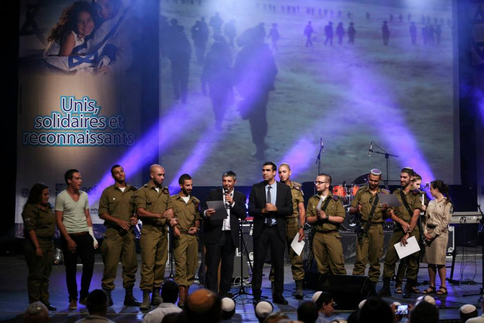 Yoni Chetboun - soldats seuls